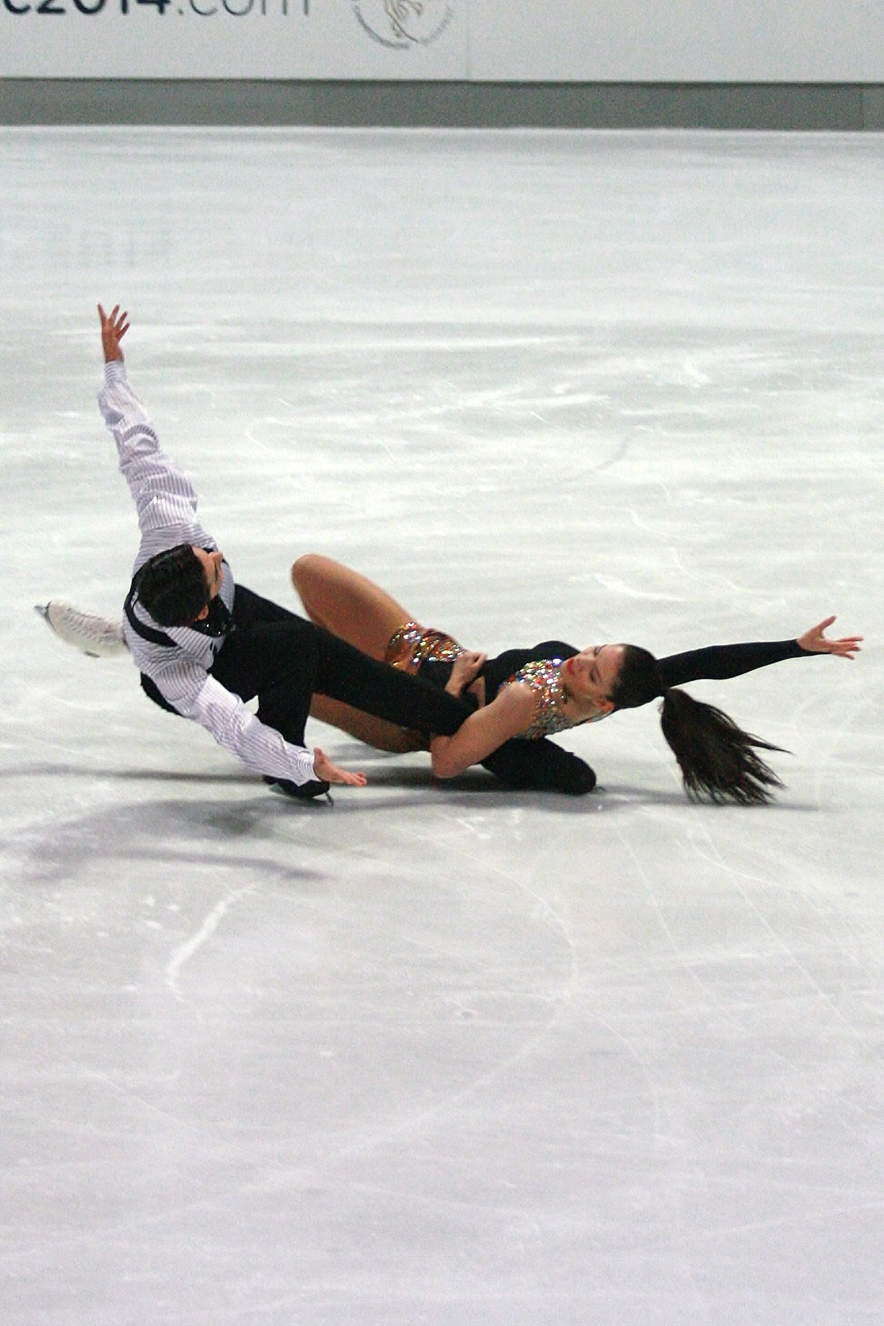 Алиса Агафонова и Альпер Учар (Турция) на 2013 Nebelhorn Trophy